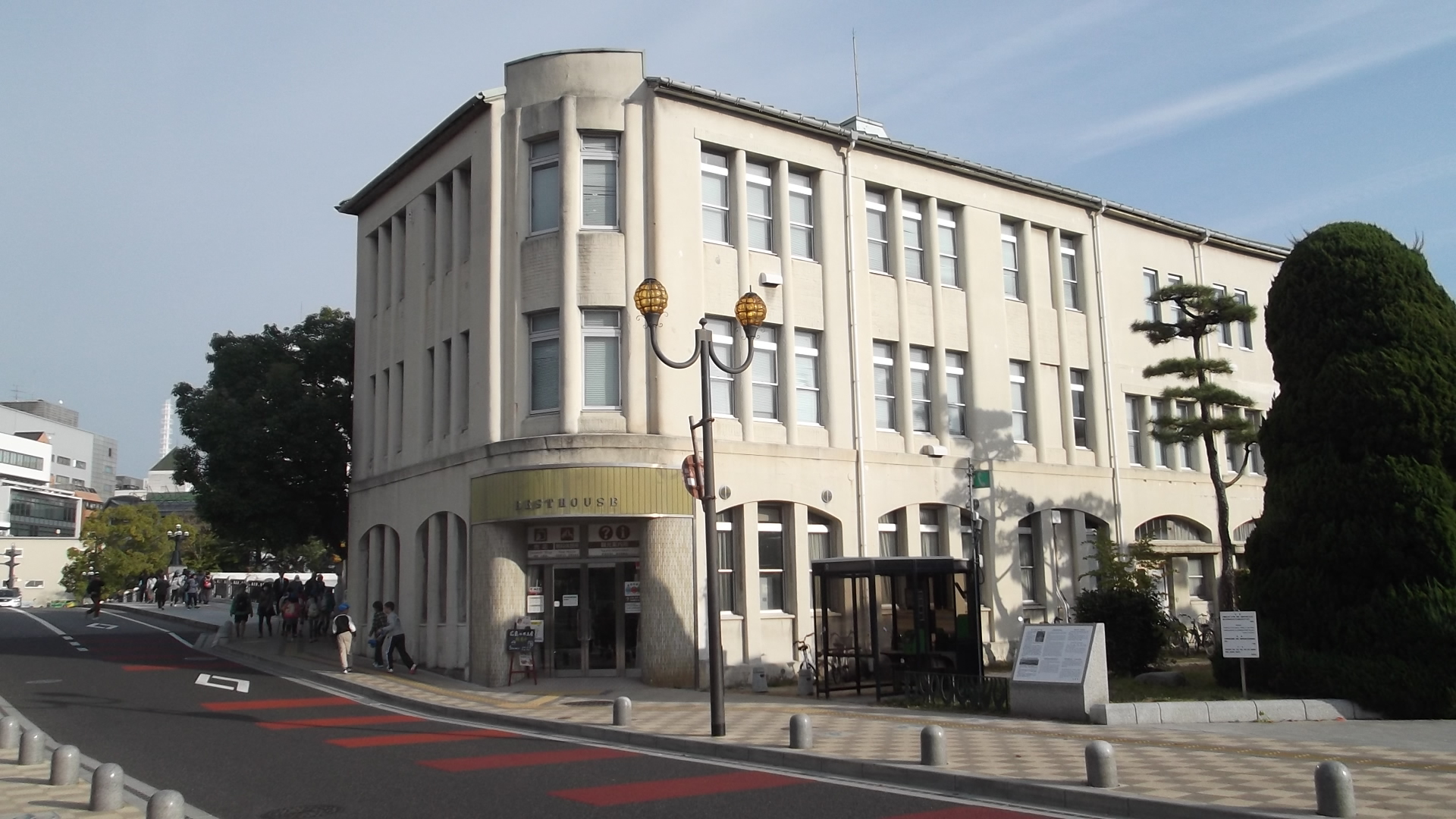 レストハウス（1945年広島市への原子爆弾投下により被爆。現在爆心地から最も近い現役使用されている被爆建物・2012年11月撮影)